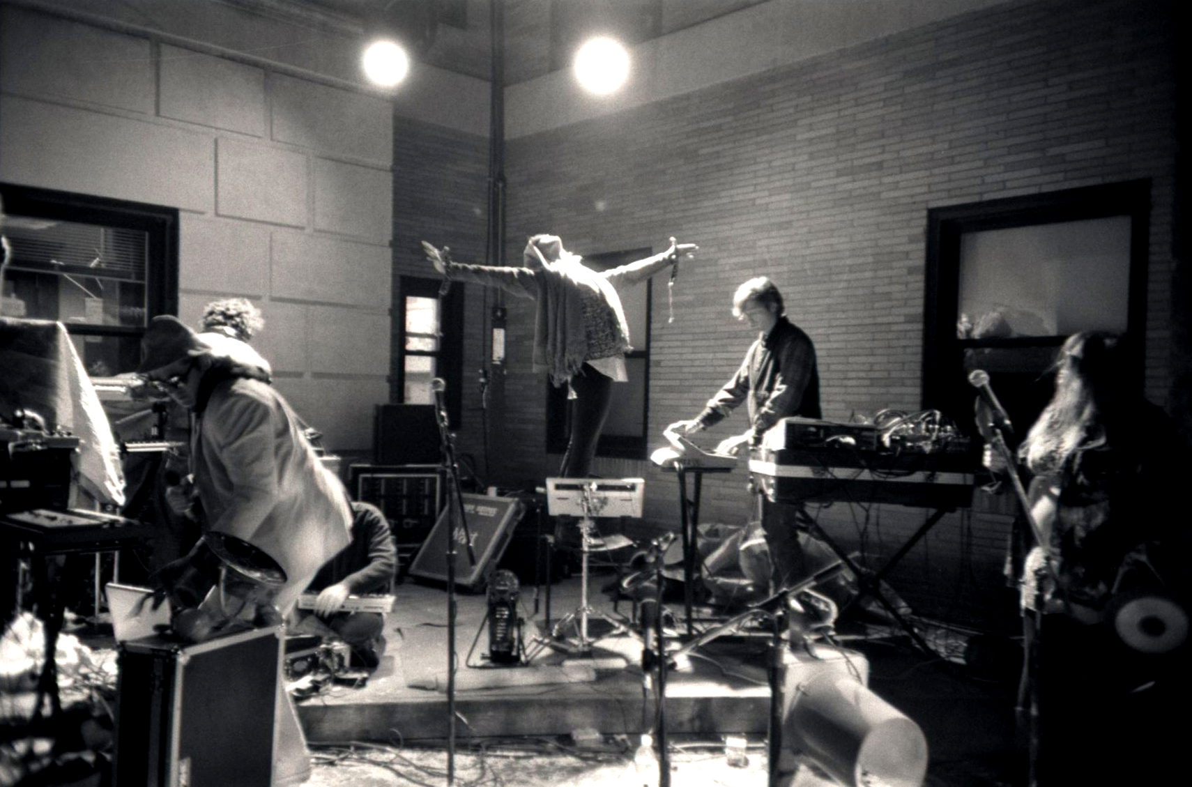 excepter @ MIT steer roast 05.03.08